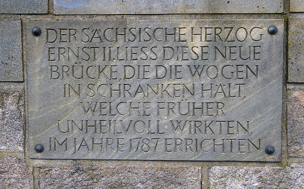 Eine der drei Schrifttafeln auf der B180-Brücke über die Pleiße bei Münsa: Herzog Ernst aus dem nahegelegenen Altenburg ließ die Brücke anno 1787 erbauen.